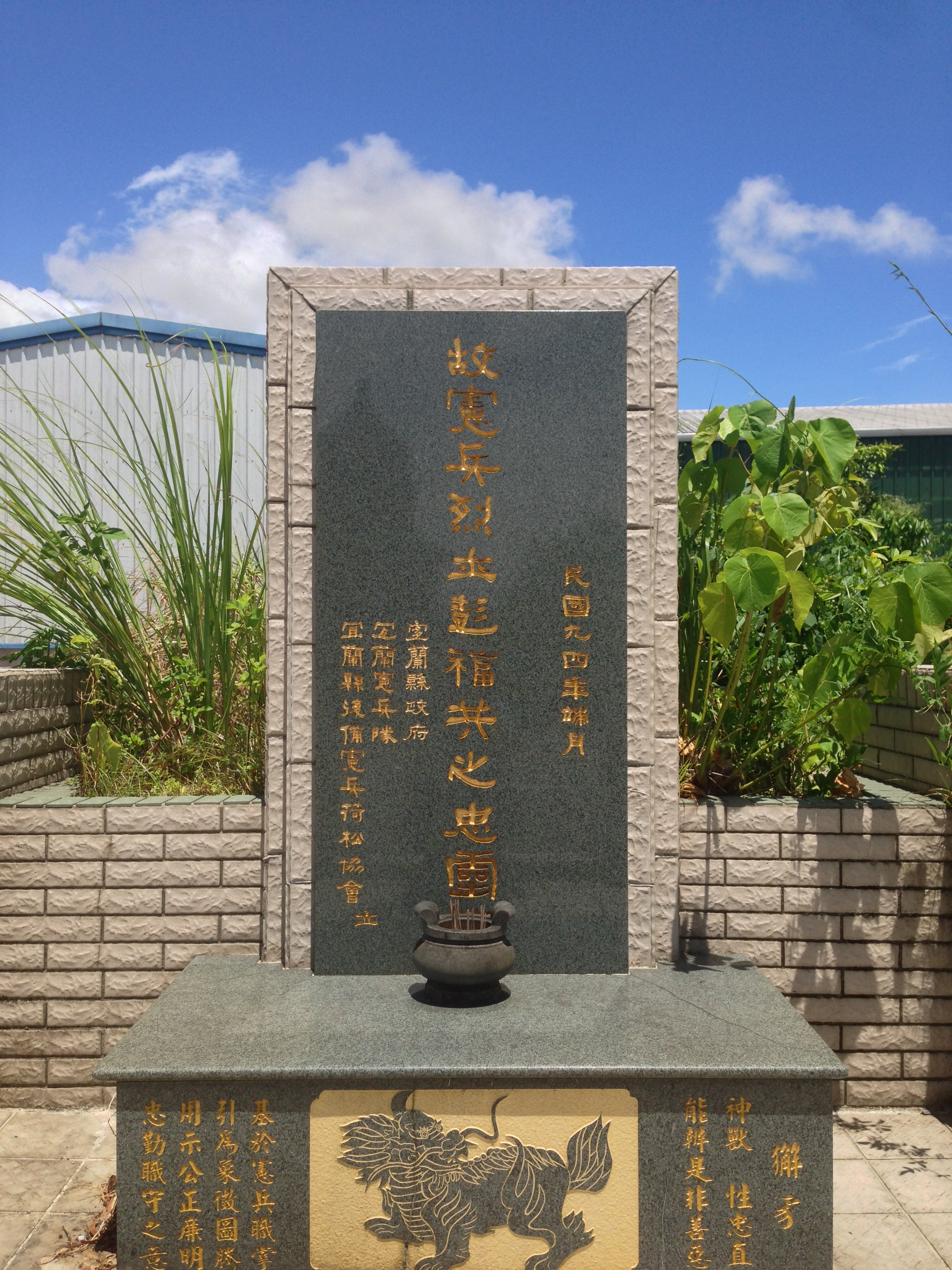 中文（台灣）: 彭福共忠靈碑正面照